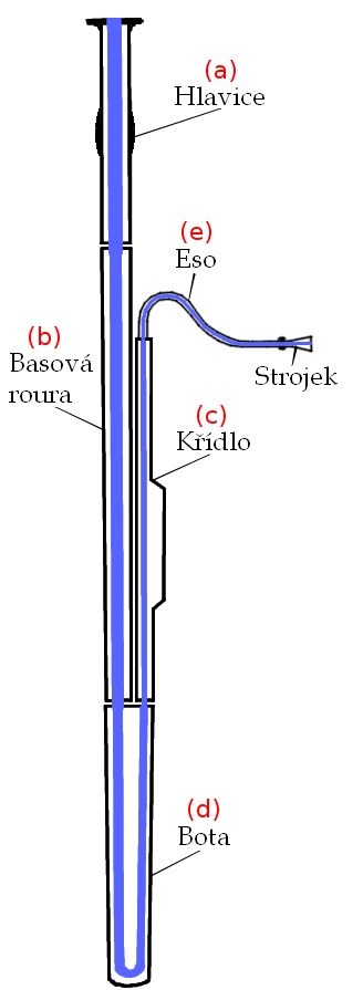 průřez fagotem, zdroj: :de:Bild:Fagott-Querschnitt.png